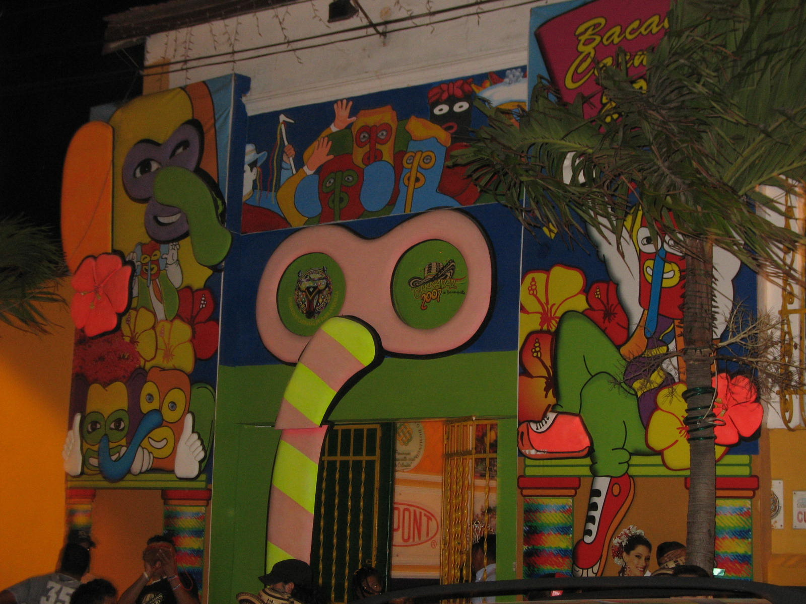 Casa del Carnaval de Barranquilla